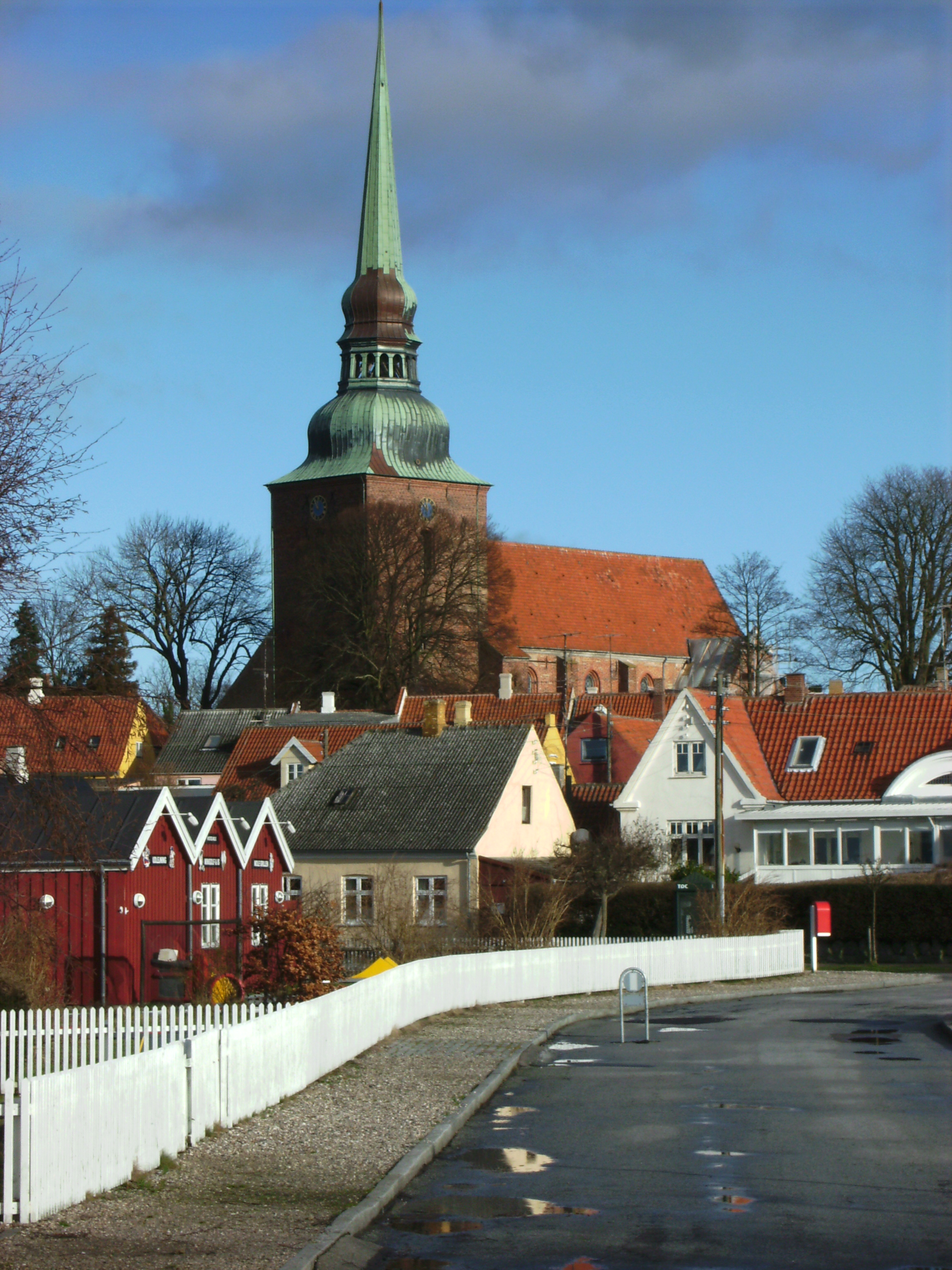 Nysted Kirke set fra havnen, Danmark